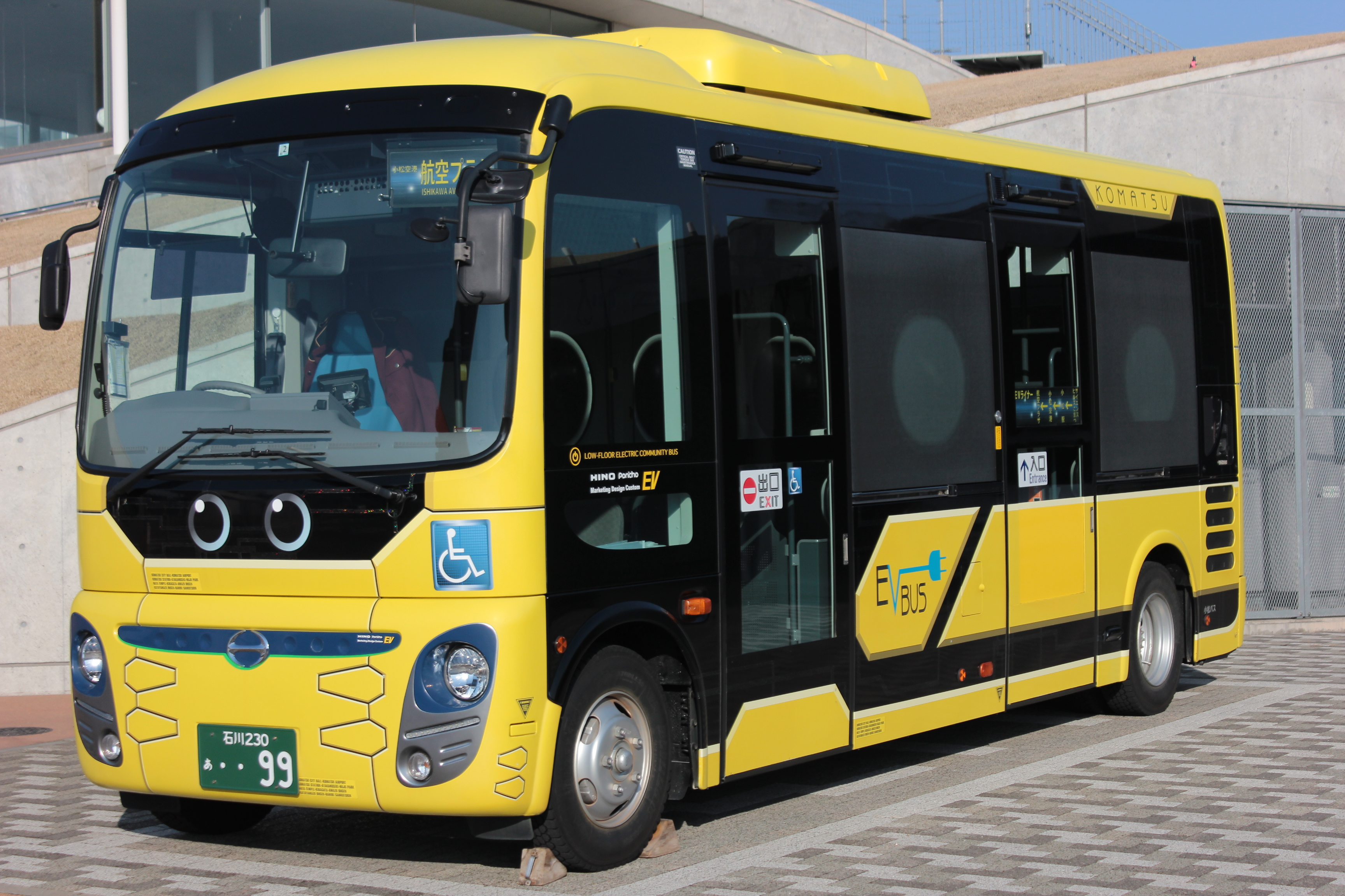 小松バスの電気バス（石川県小松市のサイエンスヒルズこまつにて） Canon EOS Kiss X5